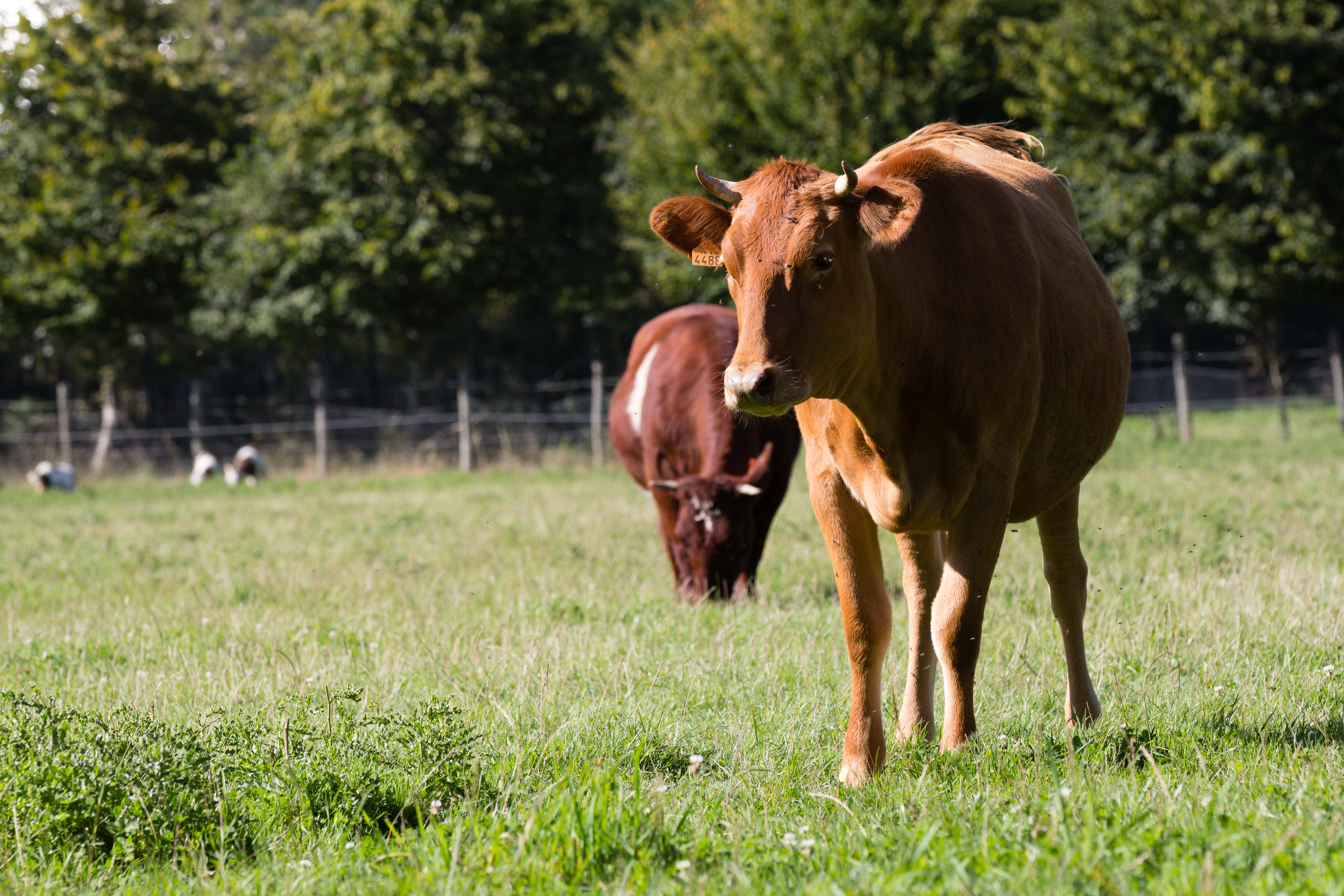 Vaches armoricaine (derrière) et froment du Léon (devant) à l'Écomusée du pays de Rennes.